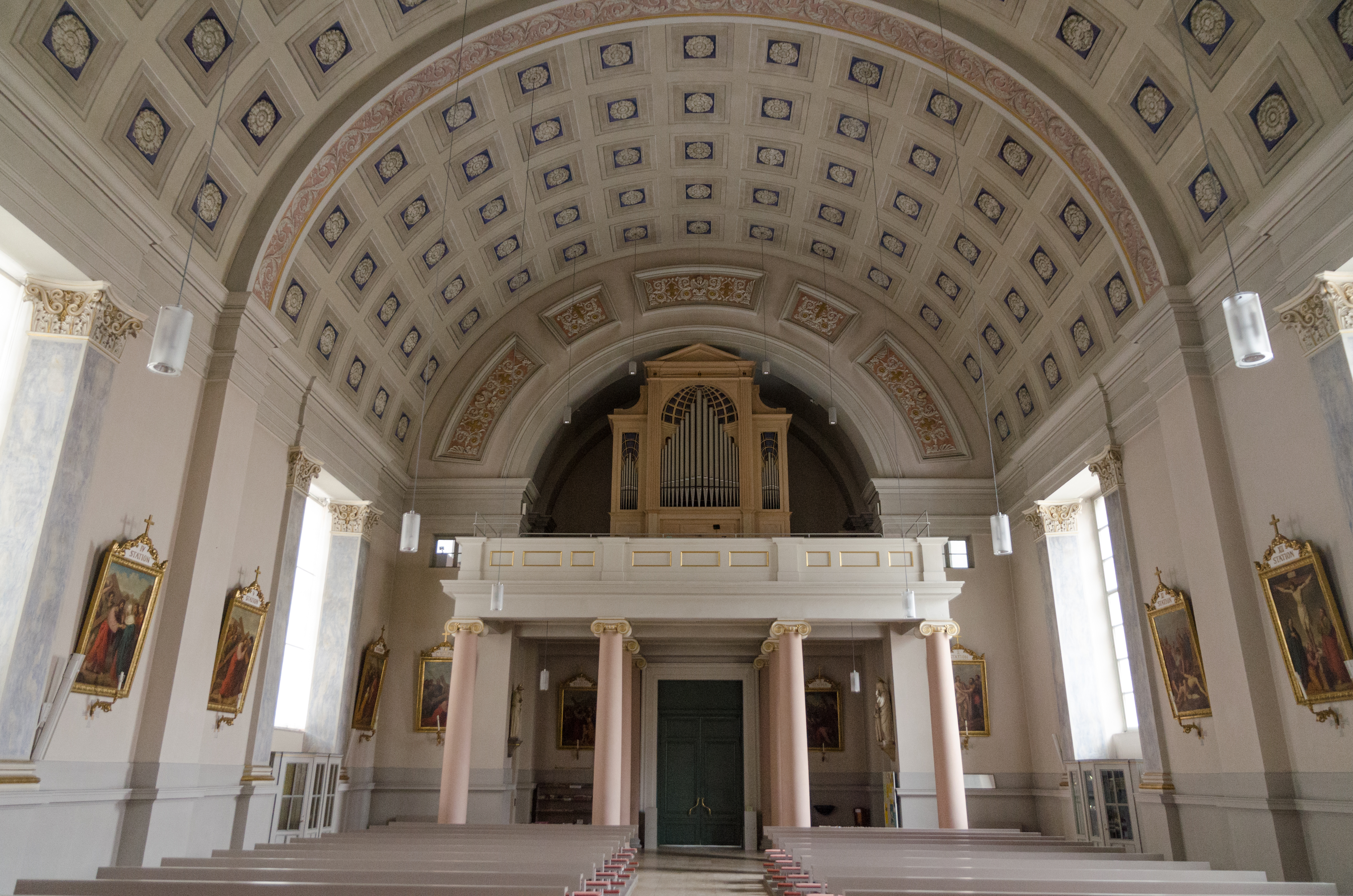 Ansbach, kath. Kirche St. Ludwig am Karlsplatz